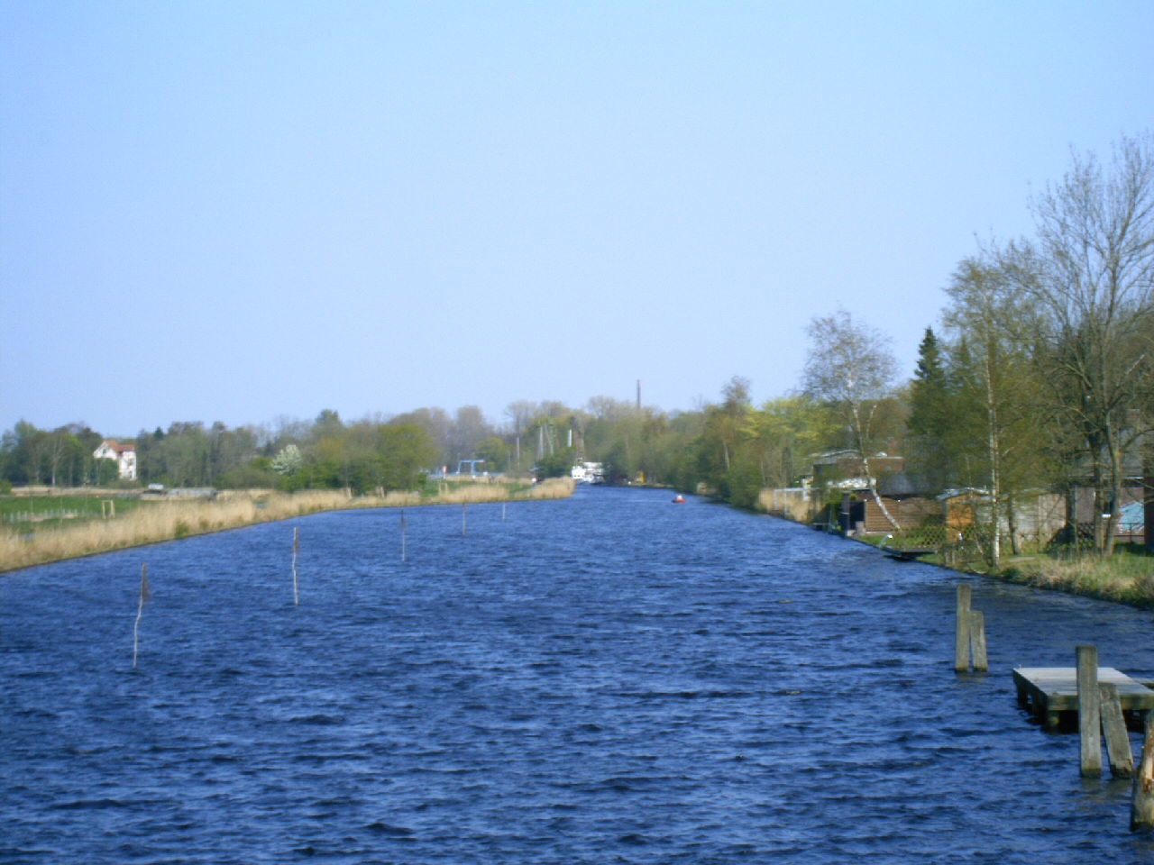 Ems-Jade-Kanal bei Wilhelmshaven